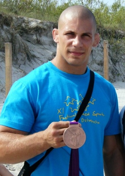 Polski zapaśnik Damian Janikowski.